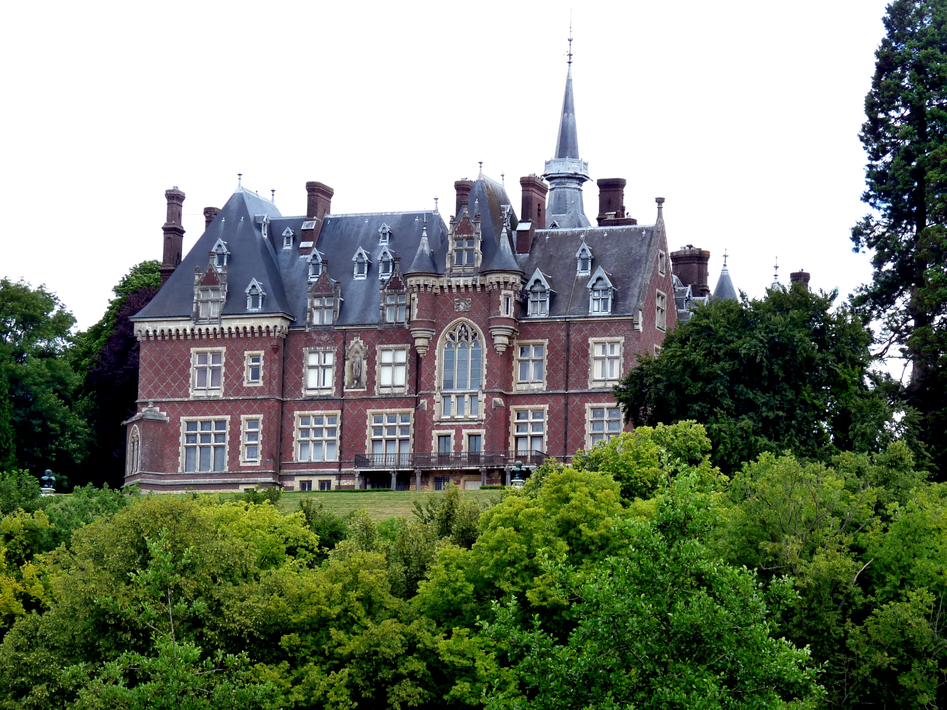 Château de Gaillefontaine, en Seine-Maritime (France) .